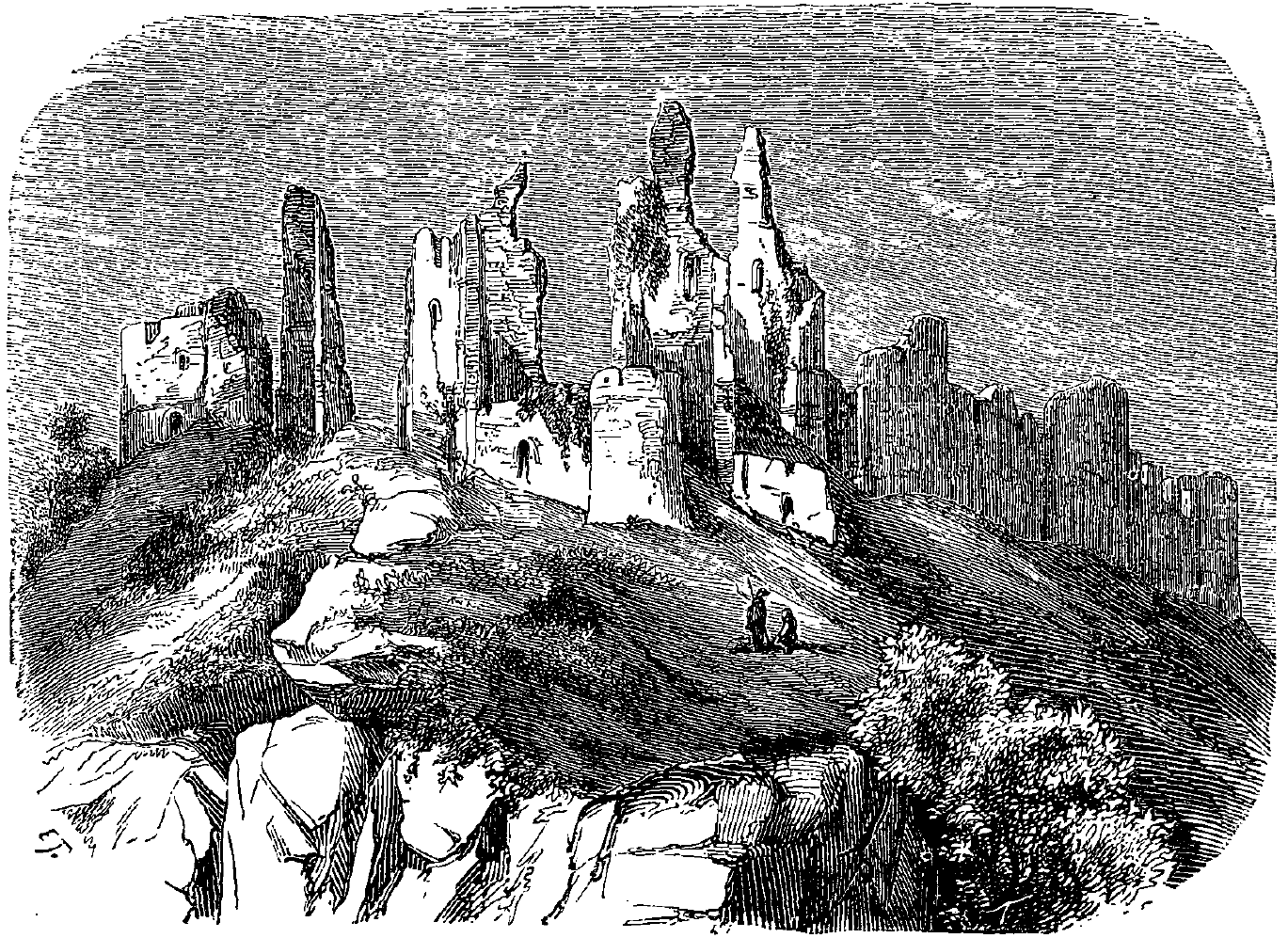 extrait de La France illustrée, géographie, histoire, administration, statistique, etc., tome I, par V.-A. Malte-Brun.